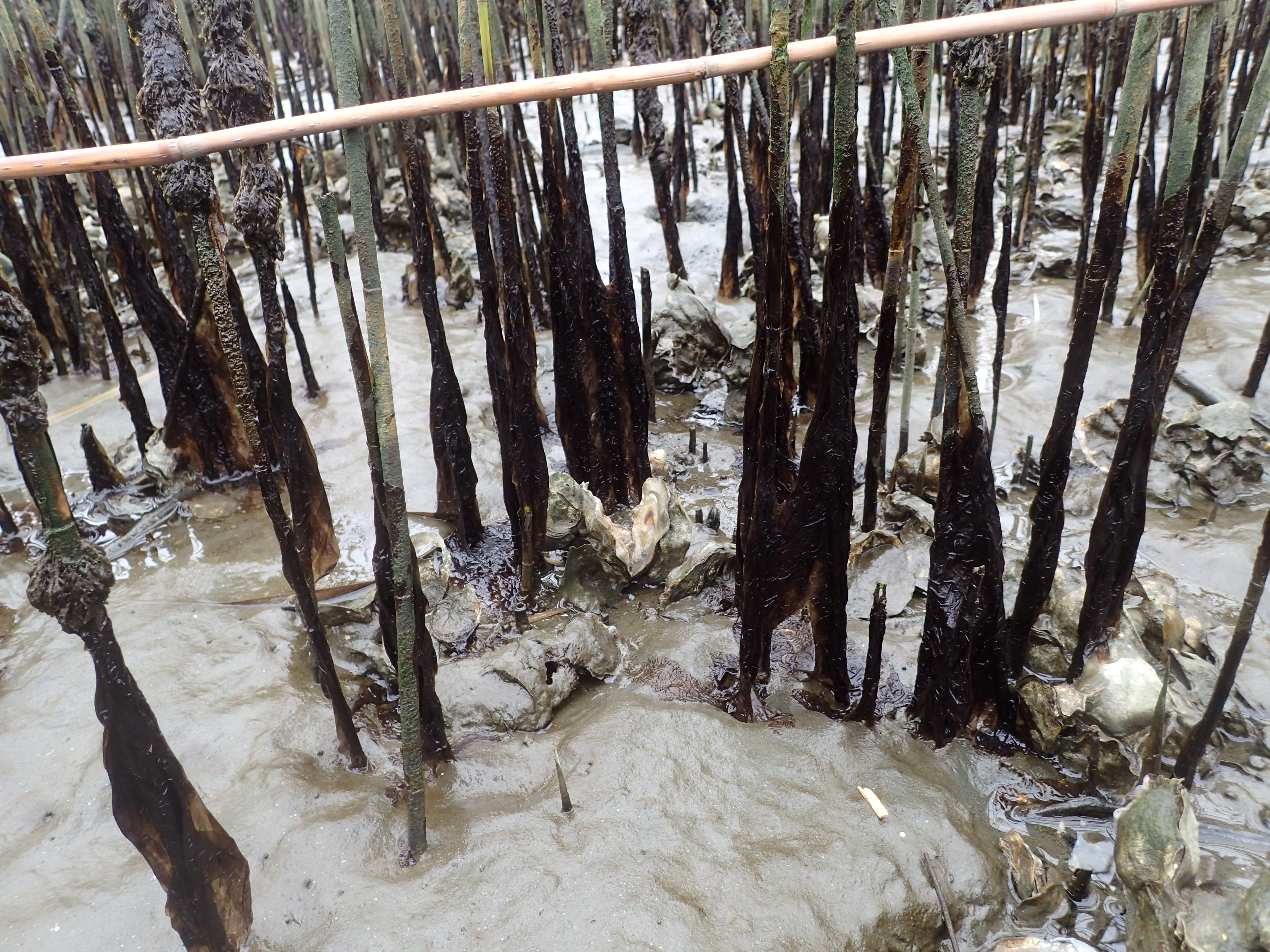 多摩川河口に自生するアサクサノリ